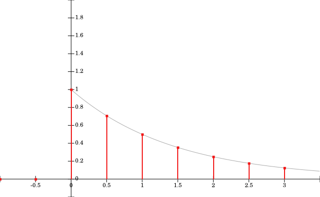 zeitdiskretes Signal zur kontinuirlichen Funktion f(x)=2^(-x)